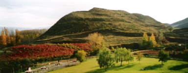 Vista del Cerro Molino de Hormilleja también denominado "El Risco"